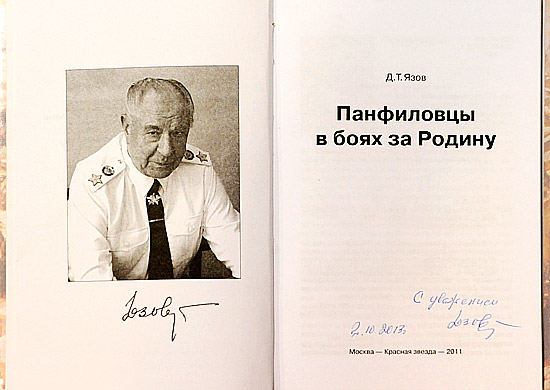 Разворот книги Дмитрия Язова «Панфиловцы в боях за Родину» с его личным автографом